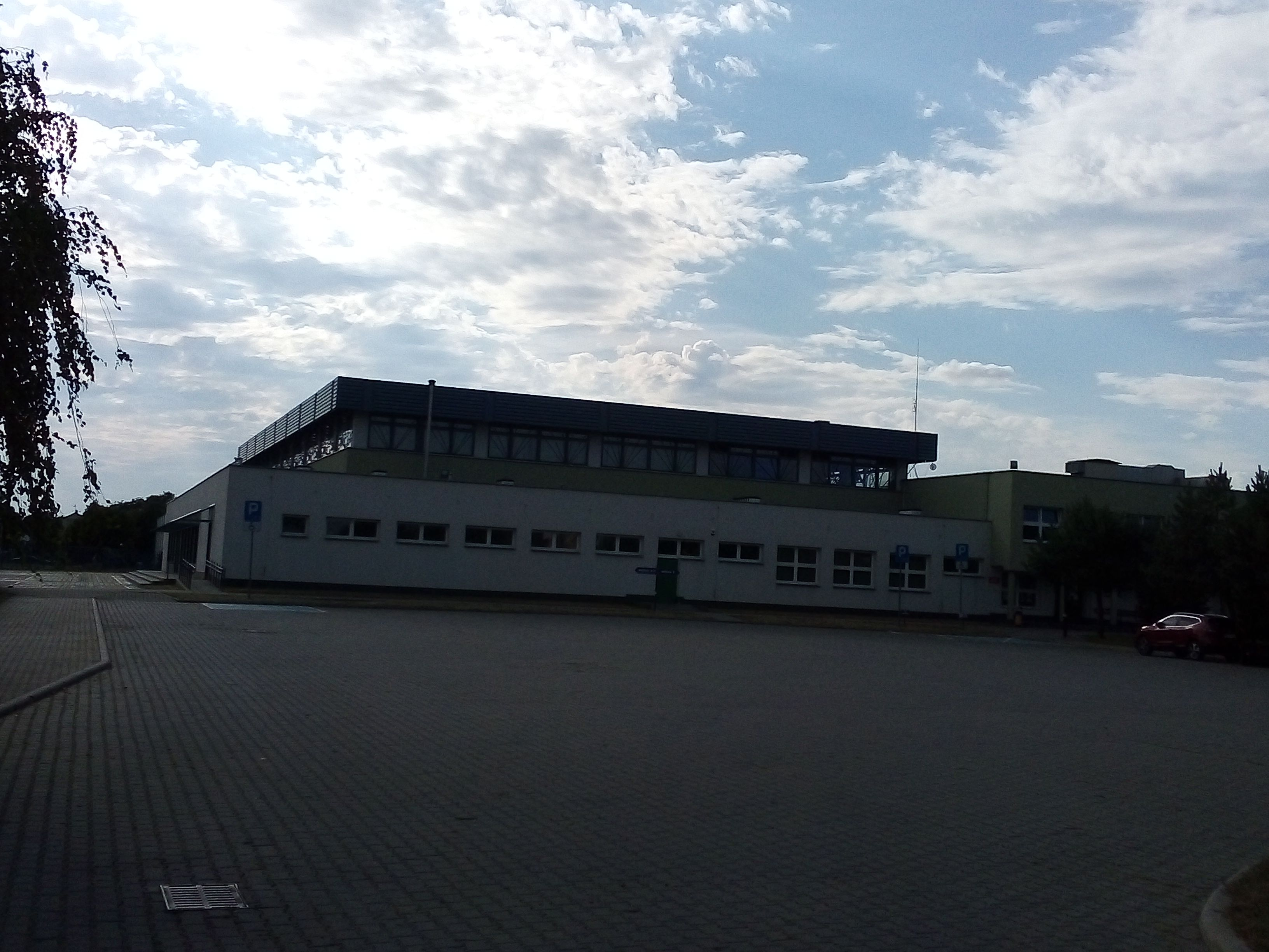 Plik reprezentuje Jonasz Kosowski.